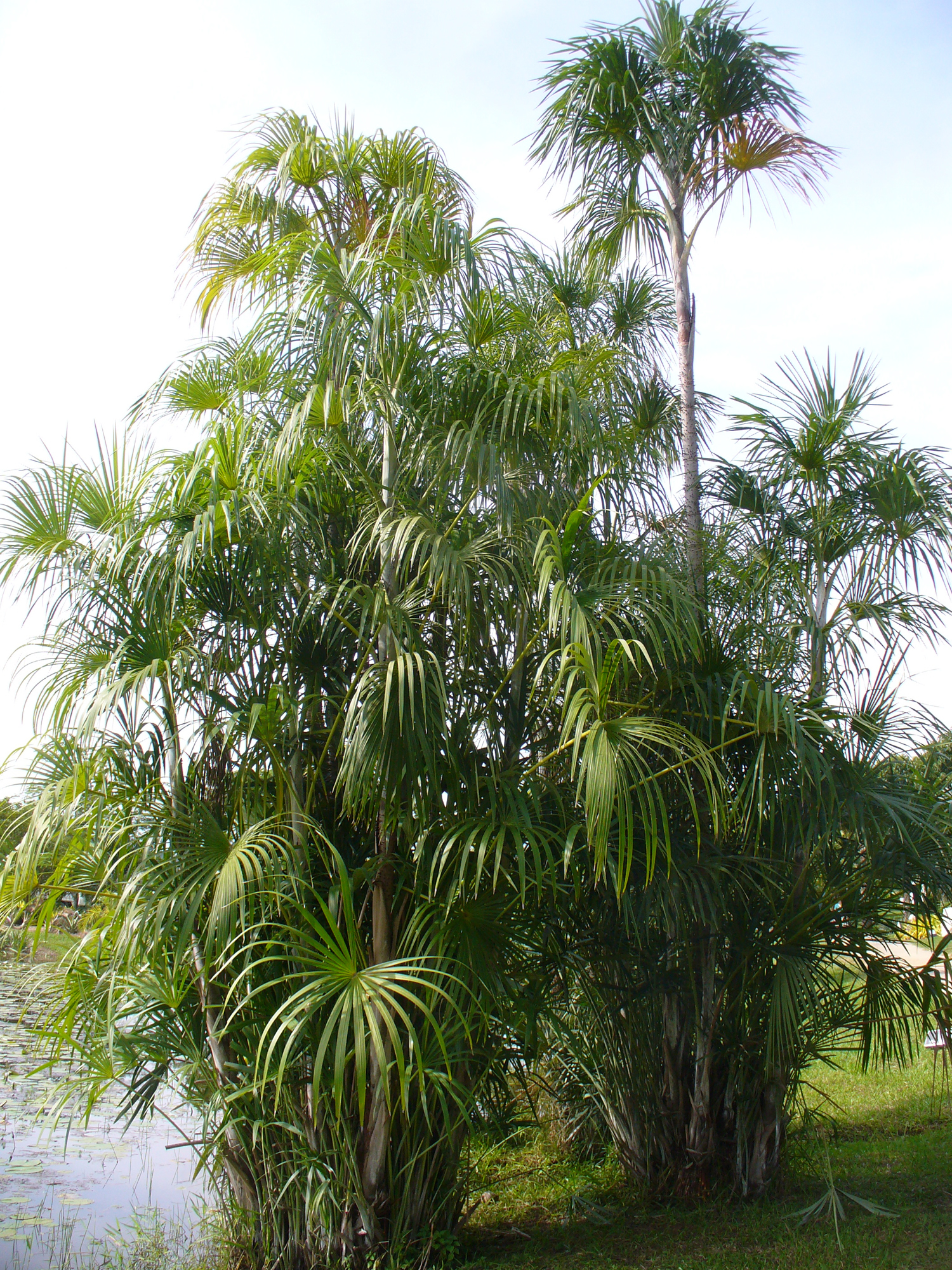 cultivated, Boa Esperanza ranch, Brazil.